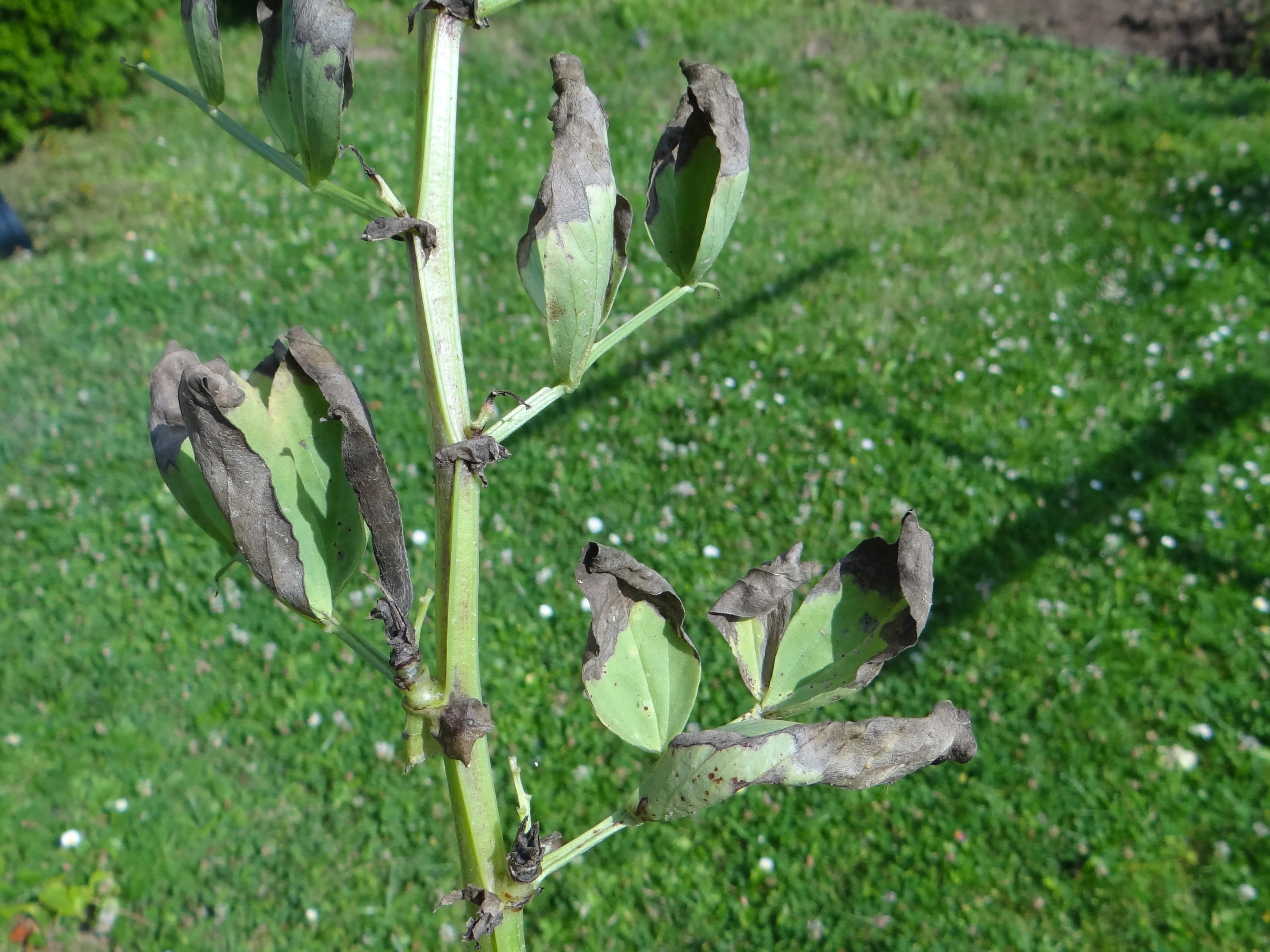 Didymella fabae on Vicia faba